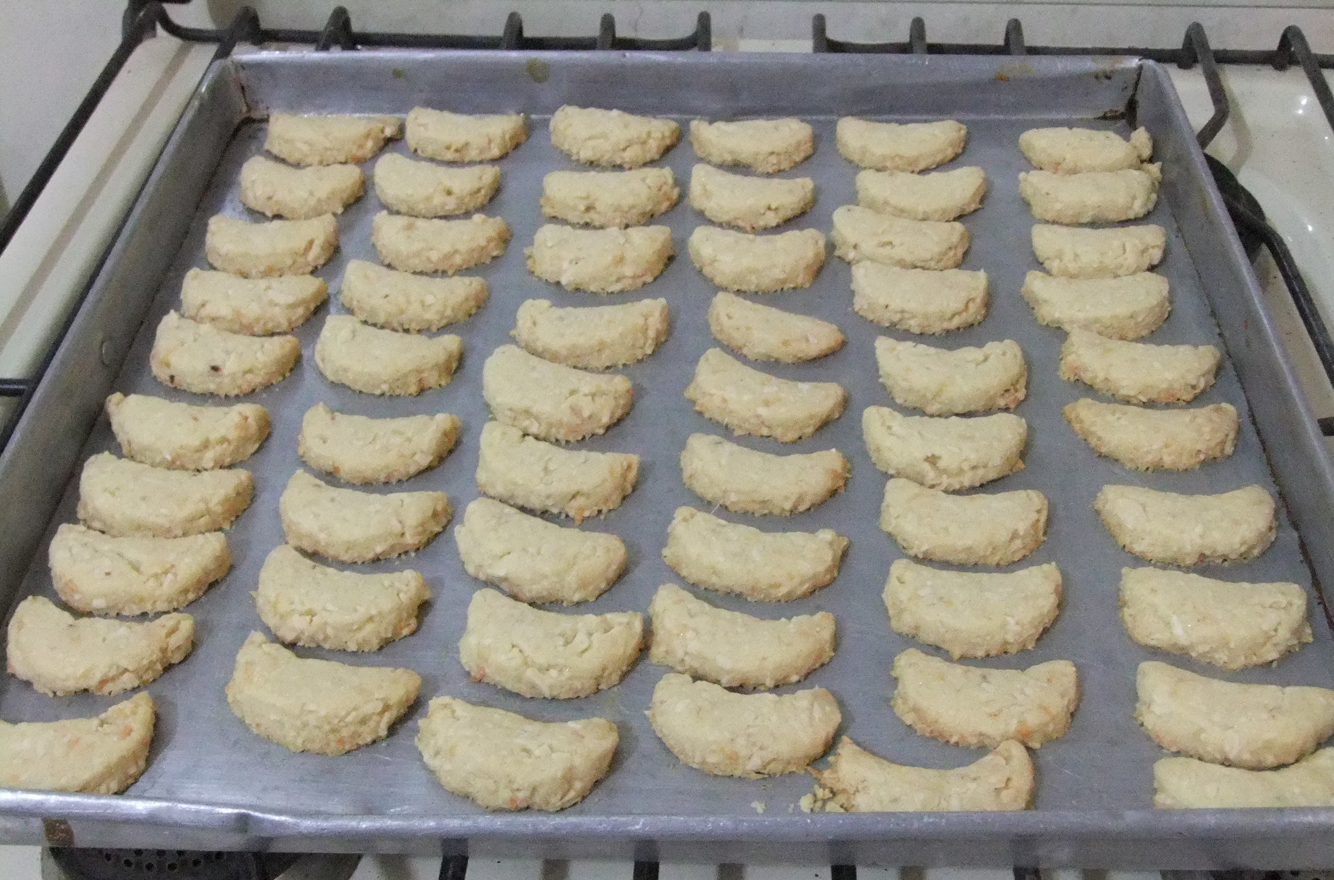 Kue putri salju, Indonesia